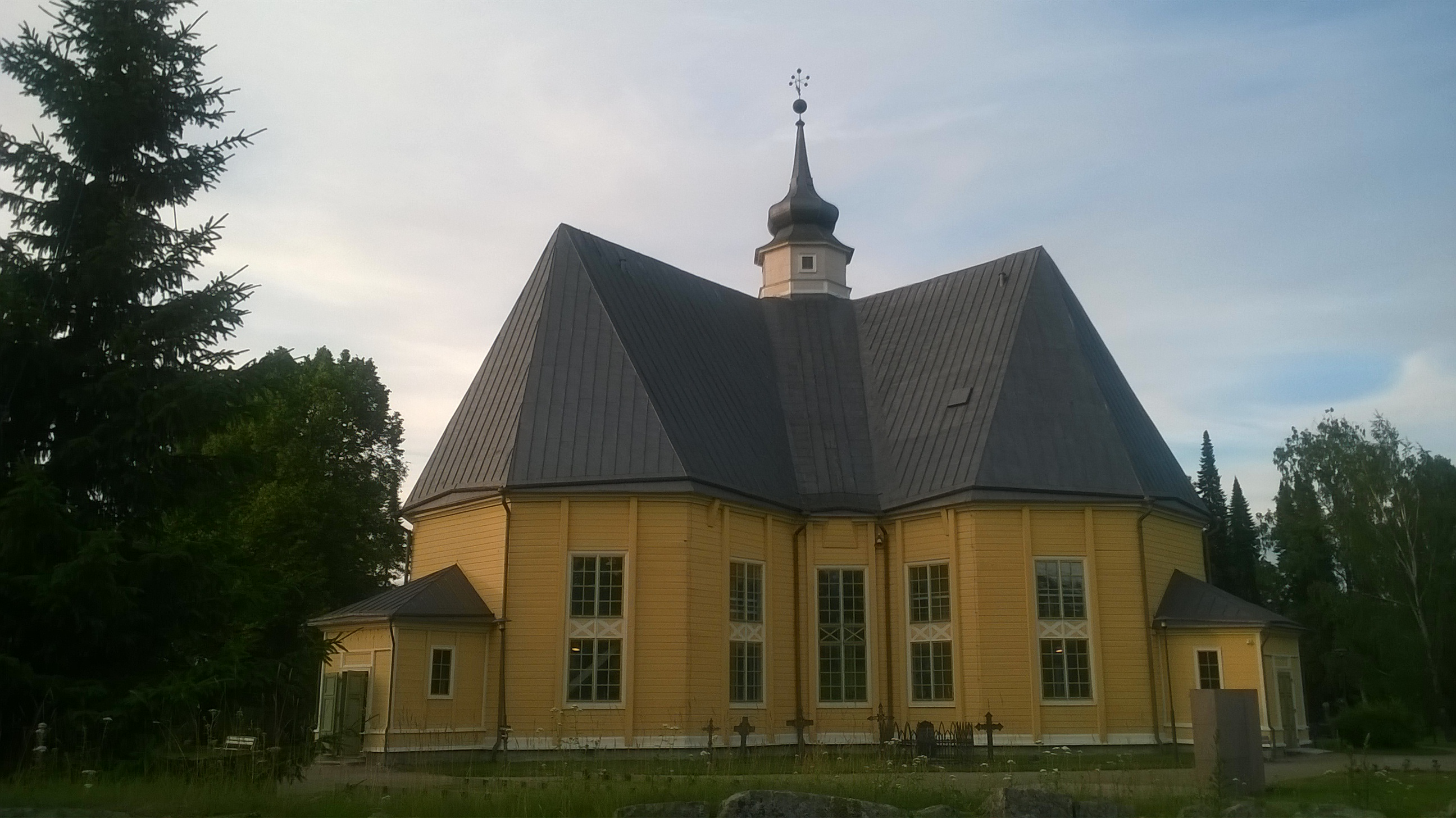 Ruoveden kirkko